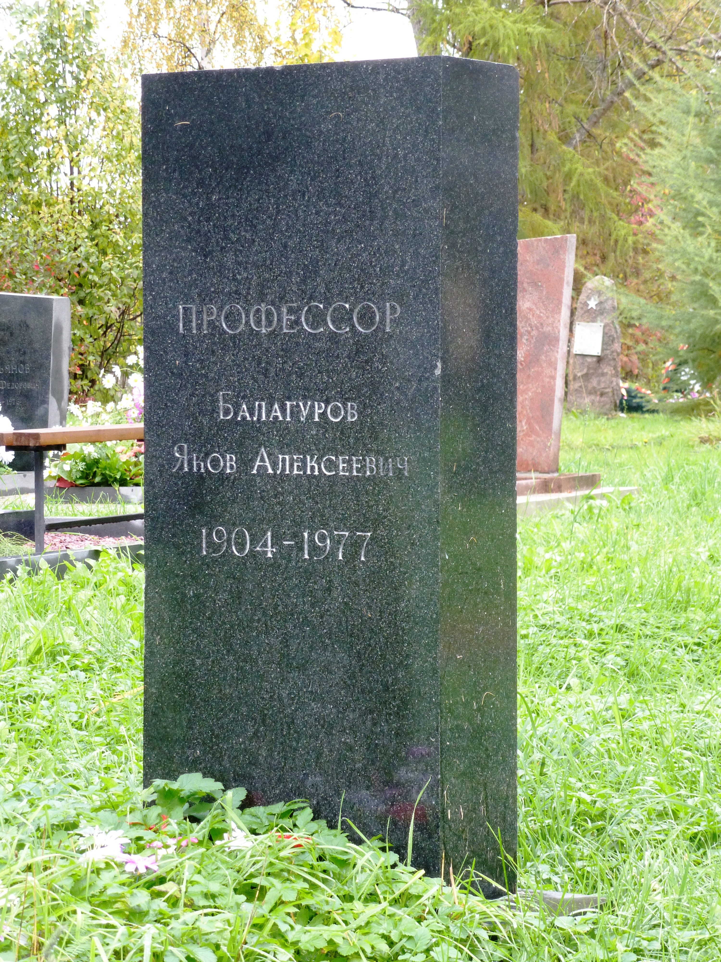 Памятник на могиле профессора Балагурова Я.А. на Сулажгорском мемориальном городском кладбище в Петрозаводске.